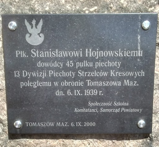 Tablica upamiętaniająca płk. Stanisława Hojnowskiego patrona III LO w Tomaszowie Mazowieckim